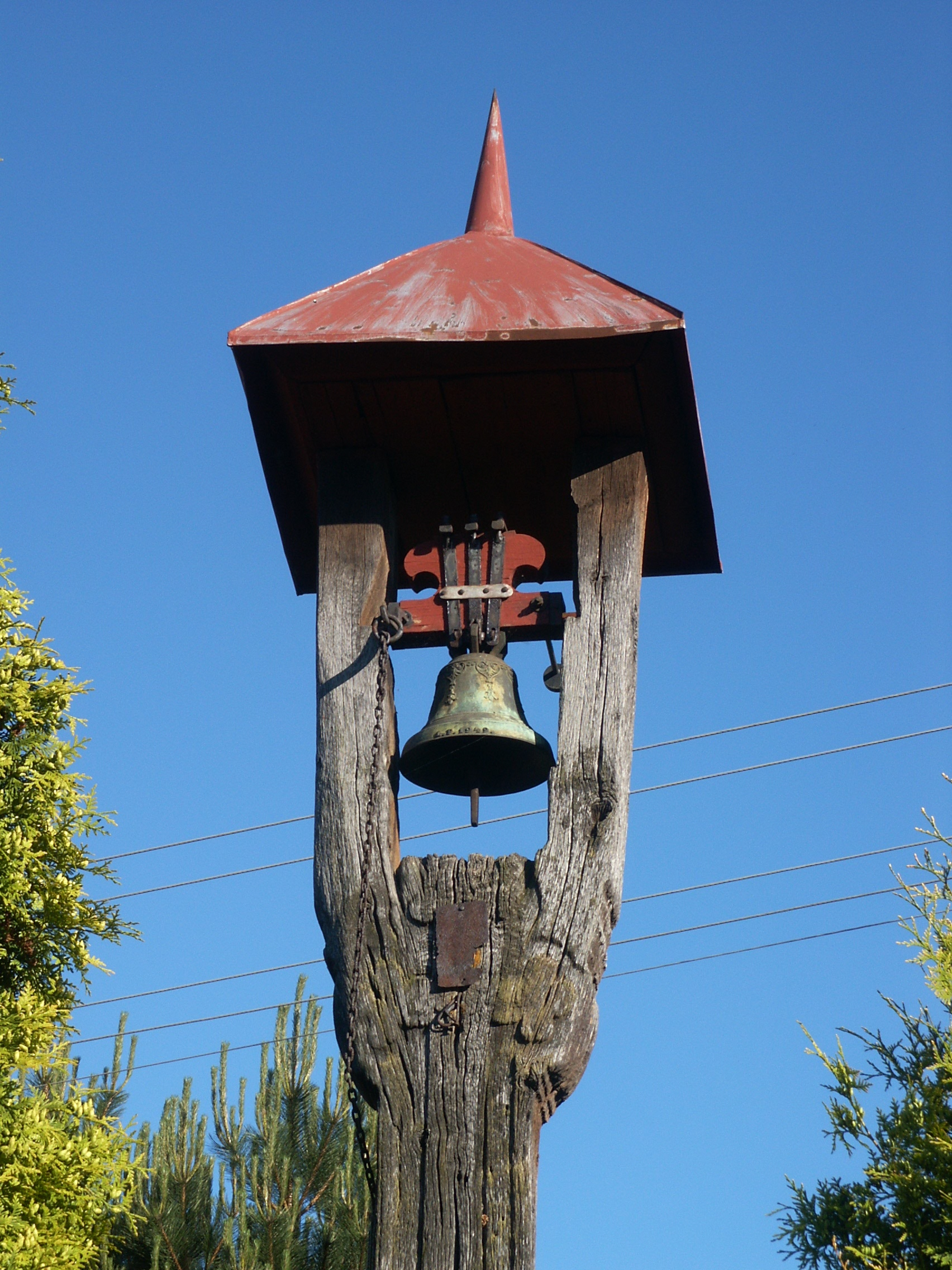 Lavice - zvonička